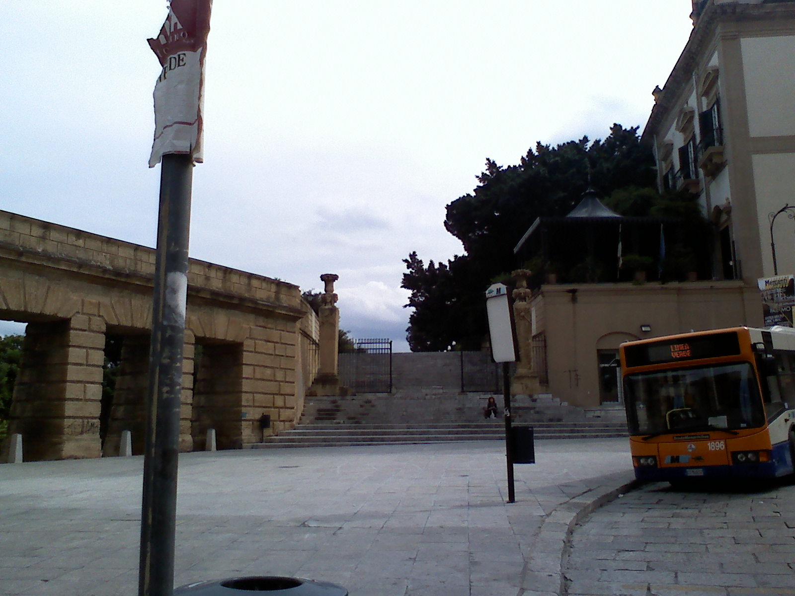 sono l'autore rilascio tutti i diritti